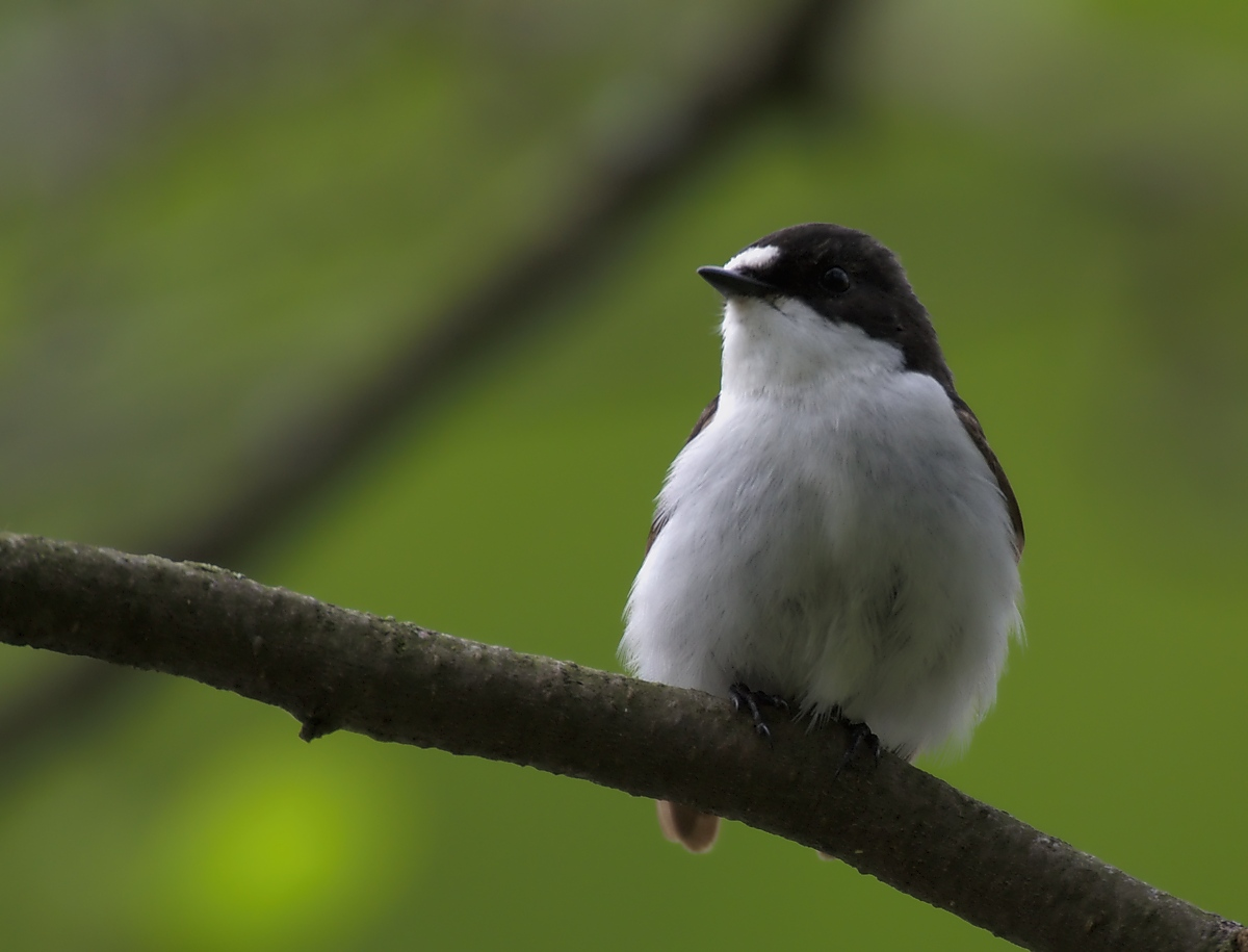 Svartvit Flugsnappare / Pied Flycatcher Ficedula hypoleuca, Slottsskogen, Göteborg, Sweden